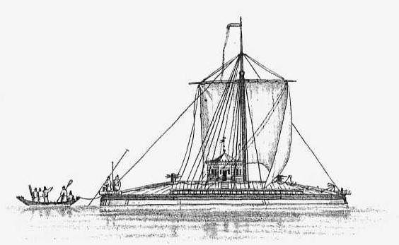 Мокшан